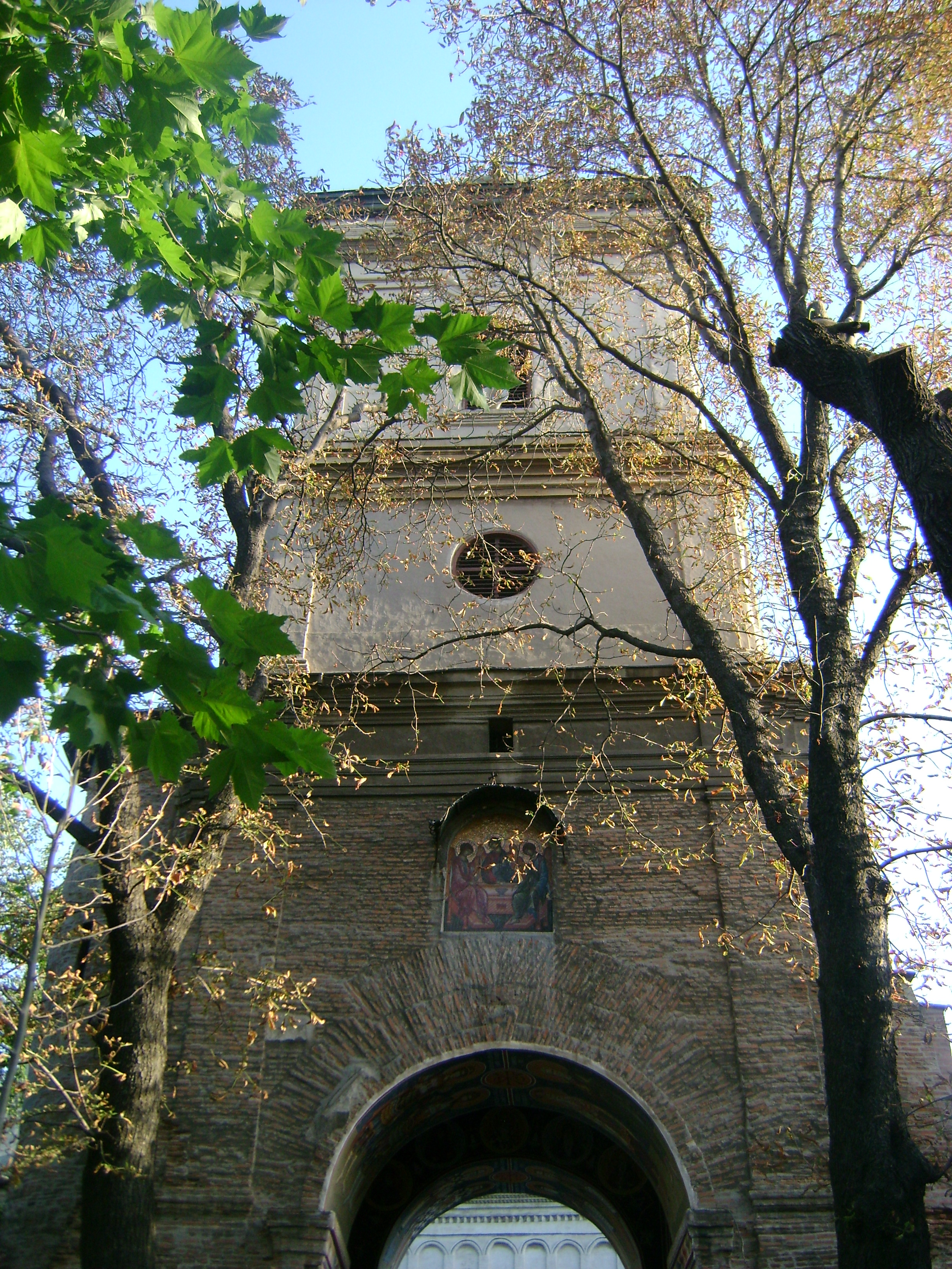 Turnul clopotnita, ce facea parte din vechile ziduri ale manastirii din 1625, este situat la nord vest de biserica şi cuprinde trei caturi exprimate în exterior prin trei registre, recladite dupa 1802. 03